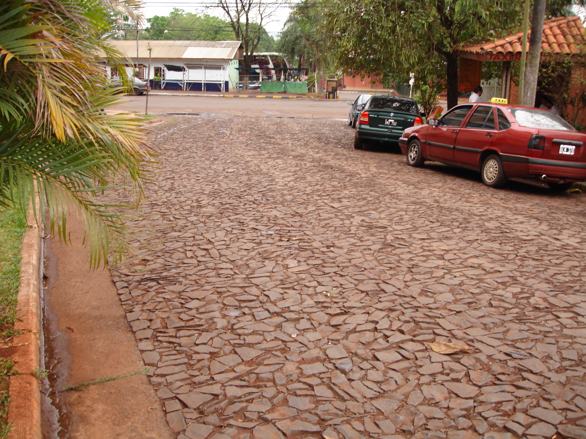 Calle de la ciudad de Puerto Iguazú